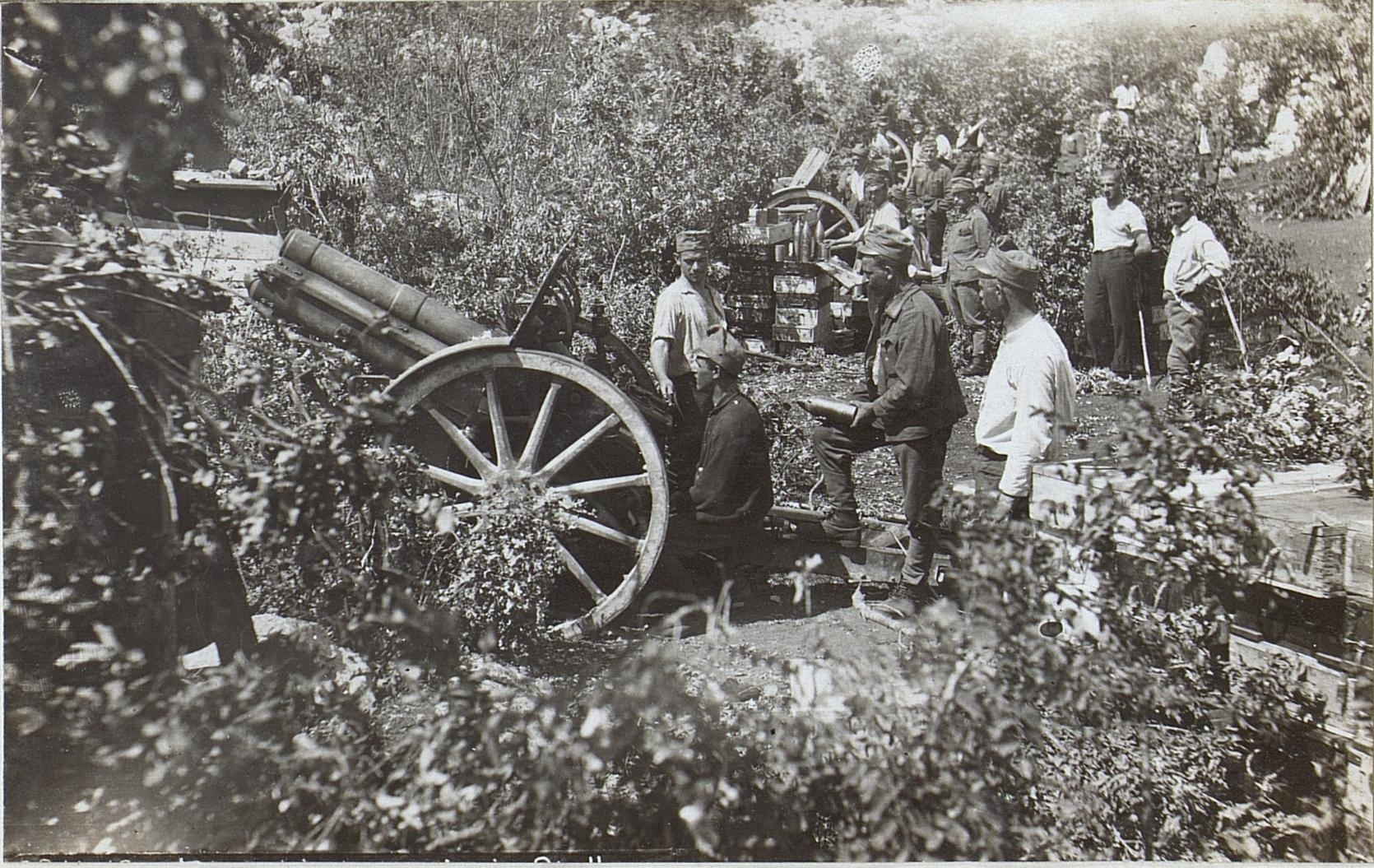 10 cm Haubitzbatt.in Stellung westl.Brestovica.Juni 17.